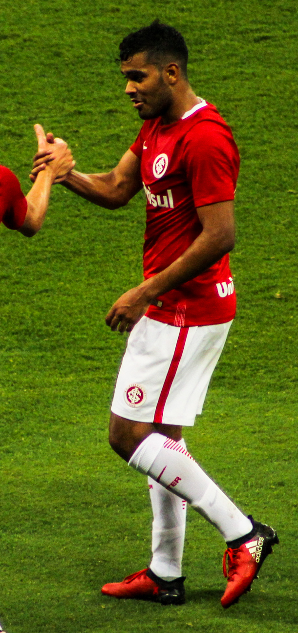 Brenner comemora gol pelo Inter em 2017